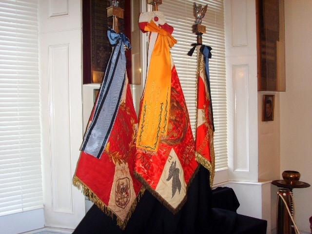 Eksponaty Instytutu im. Sikorskiego w Londynie.Pierwszy z lewej sztandar 24 Pułku Ułanów. W centrum sztandar 1 Samodzielnej Brygady Spadochronowej